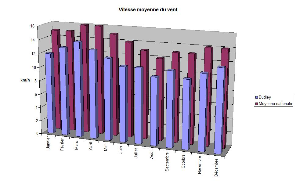 Vitese moyenne mensuelle du vent à Dudley (Géorgie, Etats-Unis) et comparaison avec la moyenne nationale